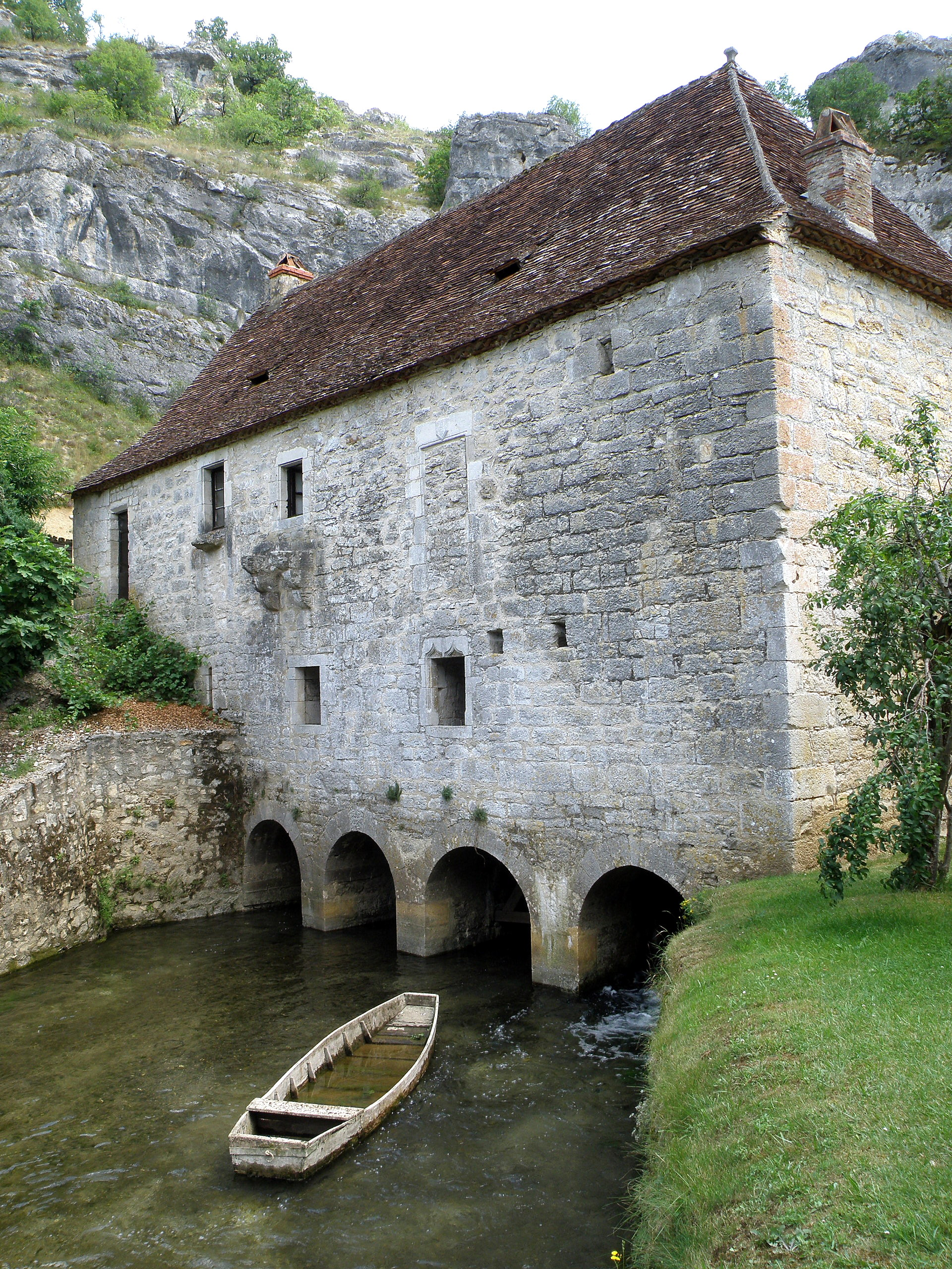 Calès, commune du département du Lot (région Midi-Pyrénées, France). Moulin à eau de Cougnaguet (ou de Cognaguet ― selon la Base Mérimée ― ou de Caugnaguet ― graphie retenue par l’IGN), sis sur la rive droite de la rivière Ouysse, affluent gauche de la Dordogne. Façade nord du moulin et bief de fuite.